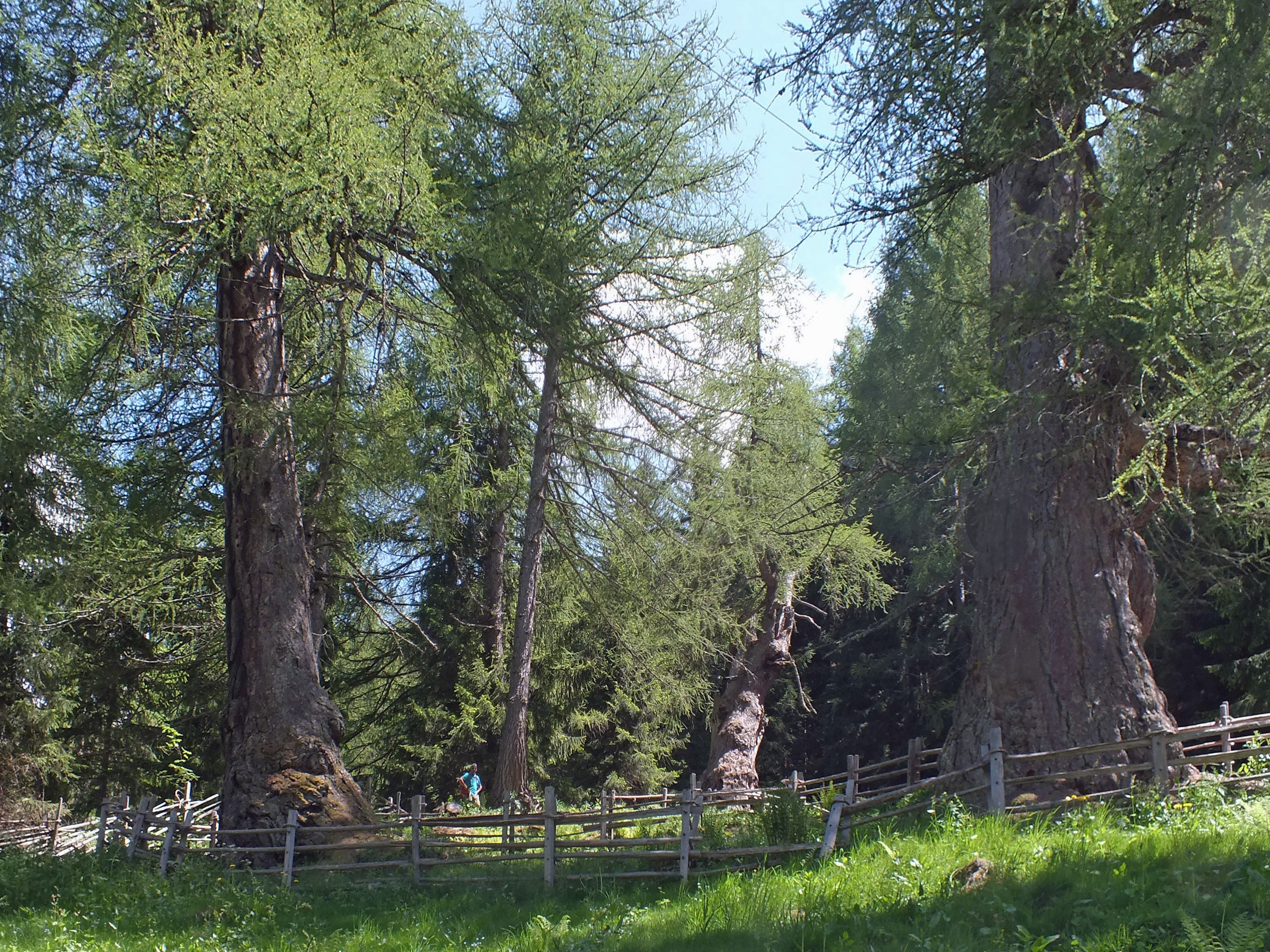 Die drei Urlärchen bei St. Gertraud im Ultental (other)